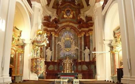 Chojnice, ul. Nowe Miasto - dawny kościół jezuicki, obecnie filialny p.w. Zwiastowania NMP, 1718-1755, 1868 (wnętrze)